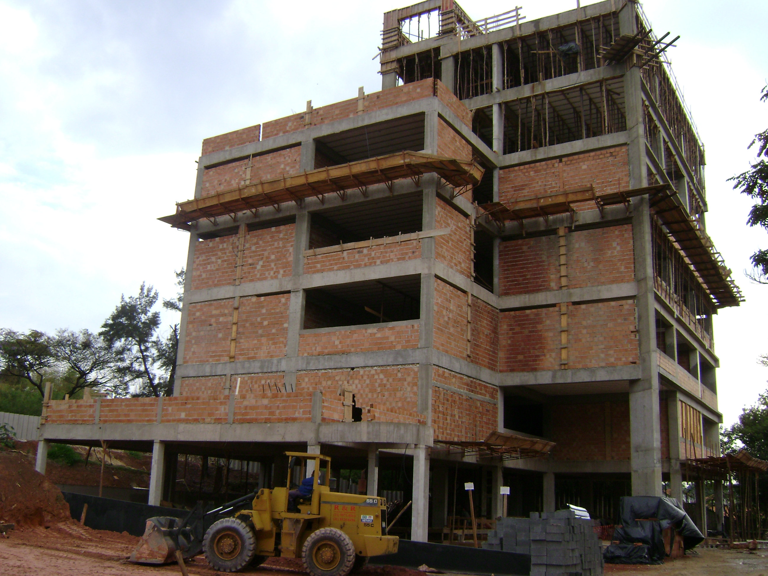 Prédio em construção no campus II do Centro Federal de Educação Tecnológica de Minas Gerais, em Belo Horizonte, Brasil.